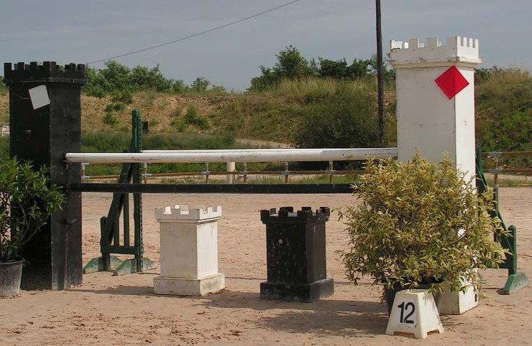 Auteur : moi-même Licence free Date : 09/07/2006 lieu : Niort (79-France)